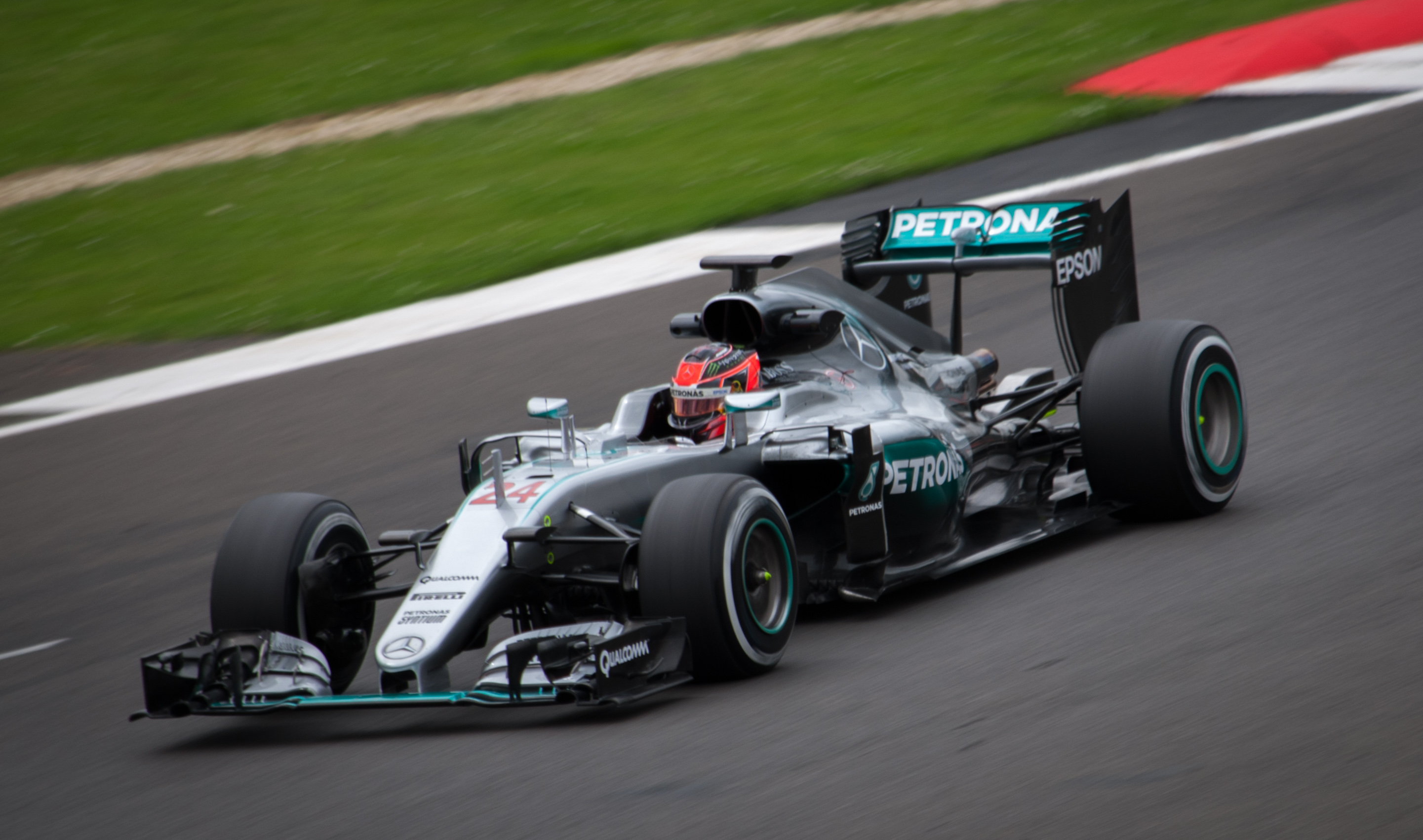 Esteban Ocon - Mercedes